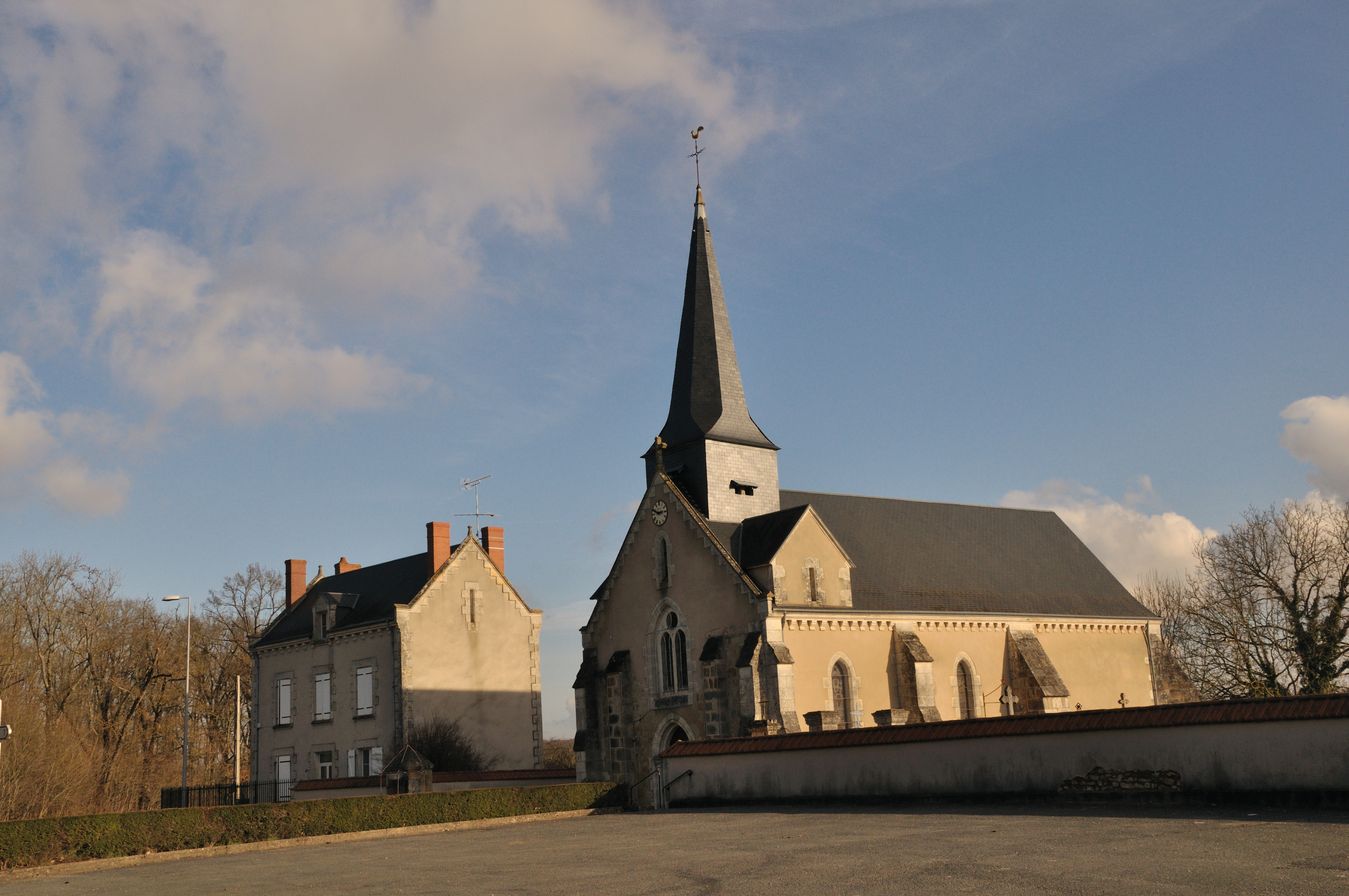 Buxières d'Aillac (Indre) - Place de l'église